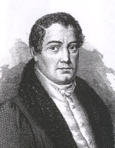 Zeichnung von Bartholomä Herder (1774 - 1839) (Zeichnung)